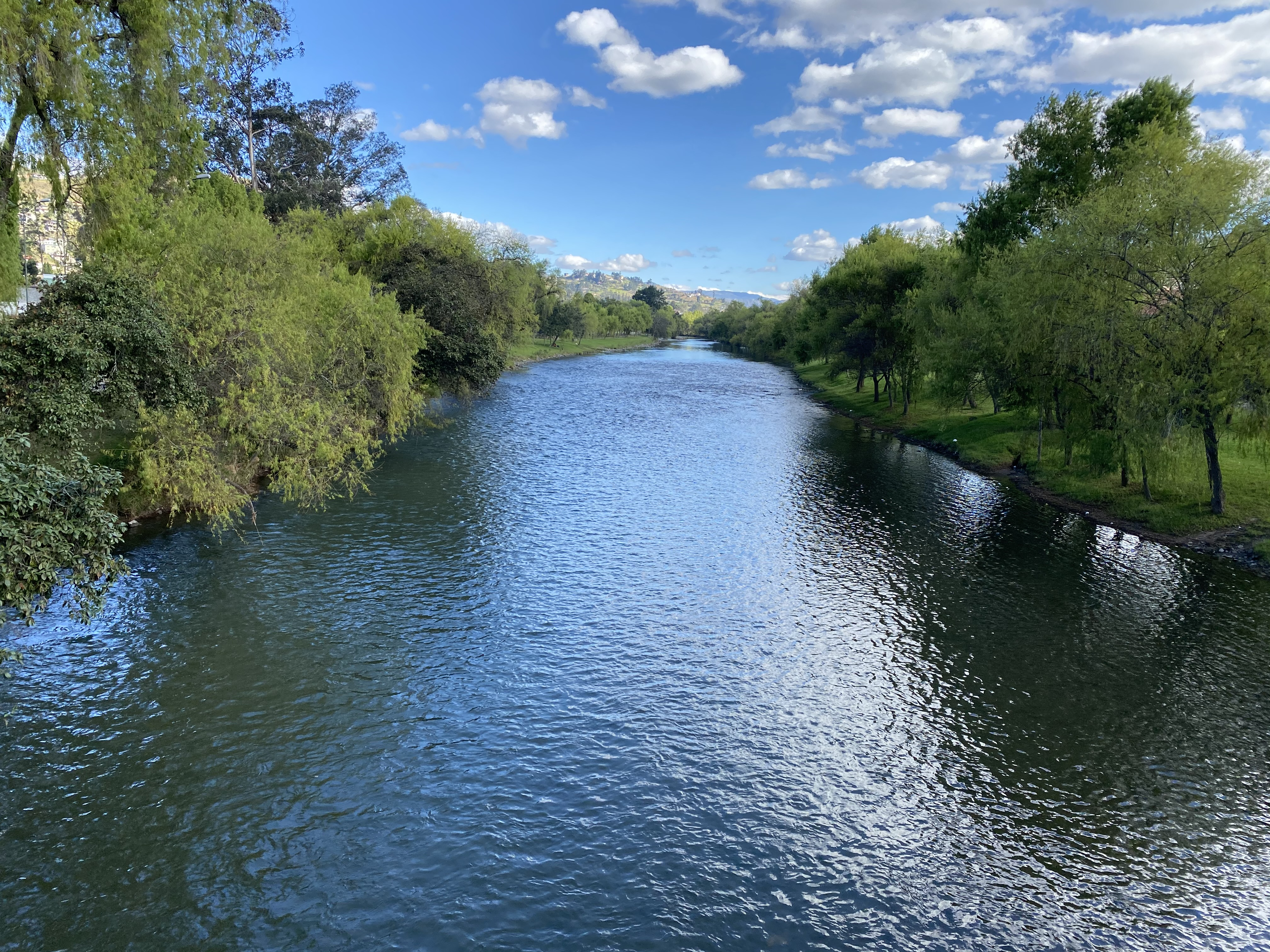 La imagen muestra el cause Rio Santa Barbara, ubicado en el cantón Gualaceo, en la provincia del Azuay